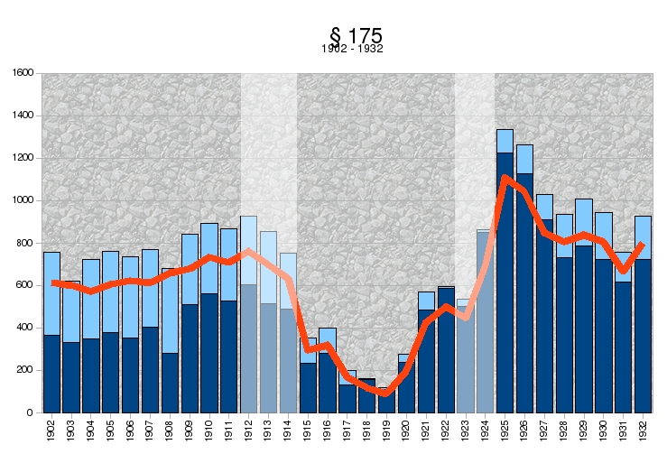 Juzgados y condenados por el §175 (1902-1932); Azul oscuro: juzgados por homosexualidad; Azul claro: juzgados por zoofilia; Rojo: condenados; Las dos bandas más claras representan la I Guerra Mundial y el caso Haarmann.